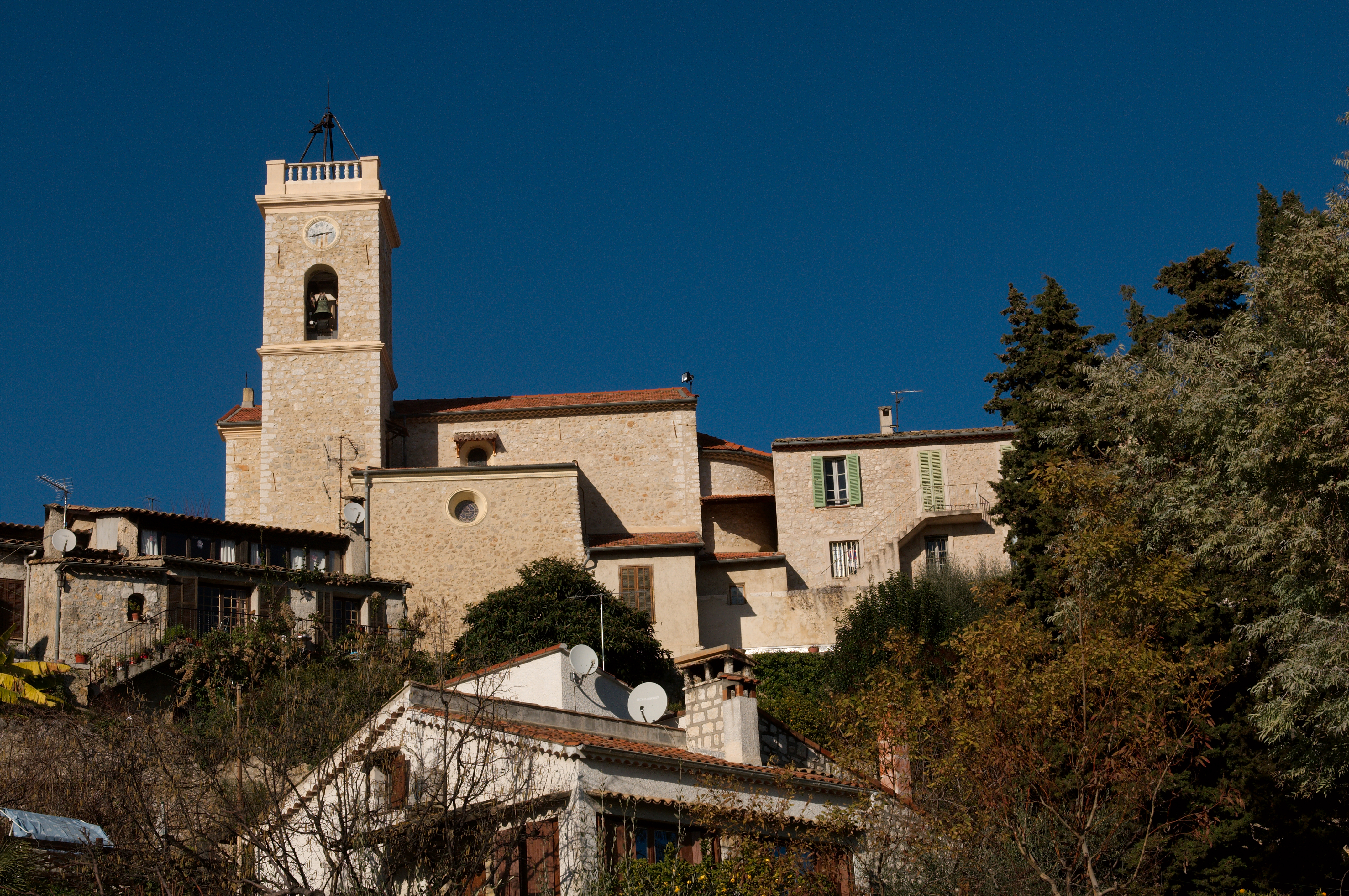 Église de La Gaude